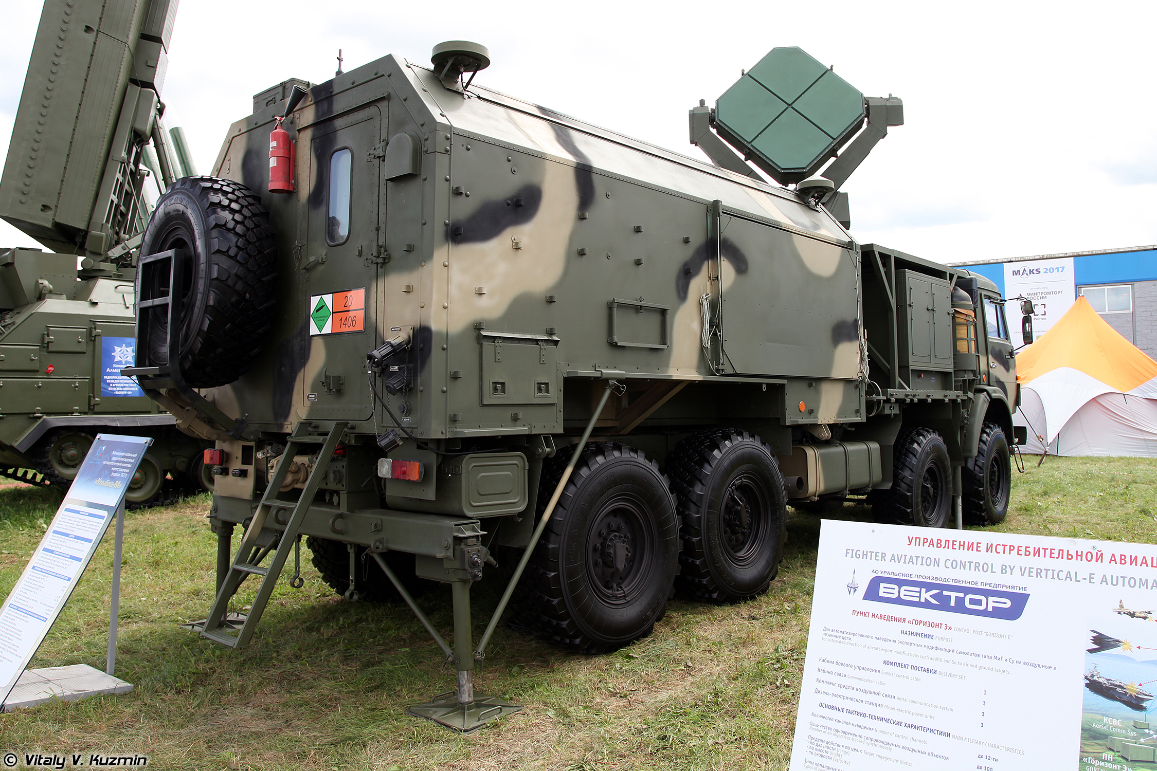 Межвидовый мобильный радиопеленгационный метеорологический комплекс 1Б77 Улыбка-М (1B77 Ulybka-M mobile meteorological system)